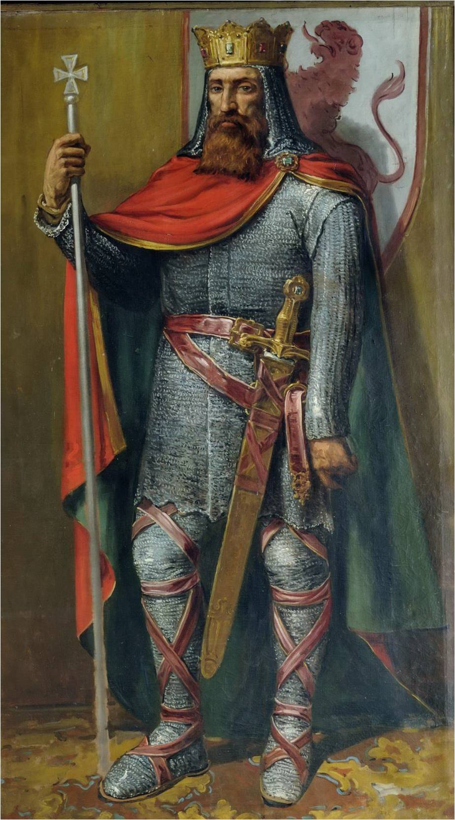 Retrato imaginario del rey Bermudo II de León († 999). Fue hijo del rey Ordoño III de León. Falleció en el año 999 y fue sucedido por su hijo, Alfonso V de León.